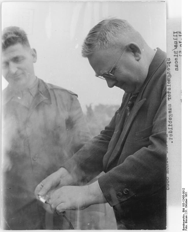 Sprengschüsse für den Frieden. Sprengmeister Willi Kummert erzielt Einsparungen von 223.000 DM im Jahre. Die einzige Sprengmeister-Brigade der ausgezeichneten Qualität. Die Sprengmeisterbrigade der Bauunion Magdeburg, die auf diesem Spezialgebiet die einzige "Brigade der ausgezeichneten Qualität" ist, arbeitet an allen Schwerpunkten der DDR und steht in dem Ruf, auch die schwierigsten Sprengungen erfolgreich durchzuführen. Die Brigade hat unter anderem schon seit Jahren den Auftrag, die ausgedienten Walzer aller Walzwerke der DDR in faustgroße Brocken zu zertrümmern und diese wertvollen Speziallegierungen, die für unseren Aufbau unentbehrlich sind, wieder den Stahlgießereien zuzuführen. Sprengmeister Willi Kummert entwickelte bei der Sprengung dieser ungewöhnlichen harten Walzen eine neue Arbeitsmethode, durch die jährlich 223.000 DM eingespart werden. UBz: Der Lehrmeister der Sprengtechniker: Sprengingenieur und Sachverständiger Friedrich Weichelt, Halle, eine international anerkannte Kapazität auf dem Gebiete des Sprengwesens. Er hat im Laufe seines Lebens schon 8000 Sprengmeister ausgebildet. Illus Biscan 31.10.51 Wa-Be.